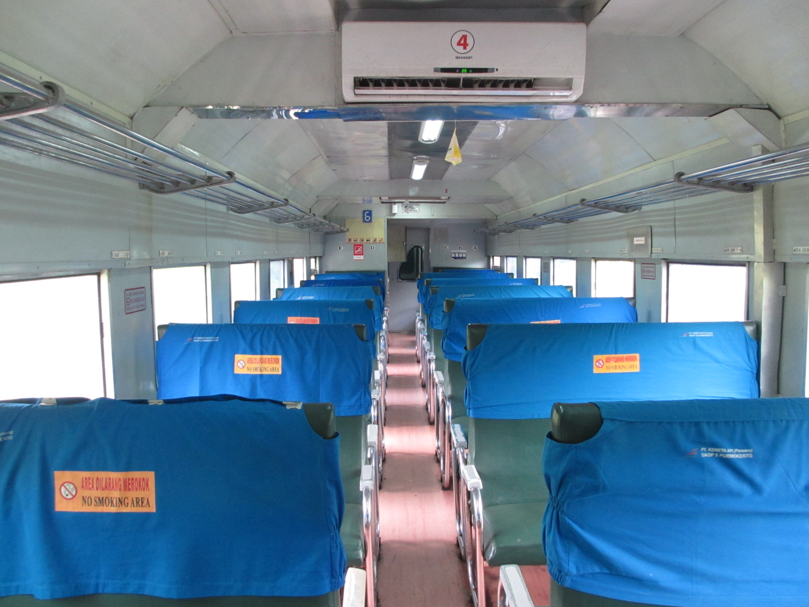 Interior KA Ekonomi Kamandaka.